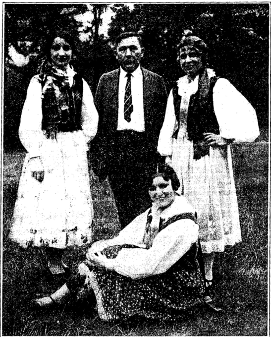 Учасники першого запису пісні "Ой верше мій, верше" Стоять Іоанна Карляк/Ioanna Karlyk [alto] Victor P. Hladyk — manager та Ева Цюрик/Eva Tsiuryk [alto].. Сидить Анна Дрань/Anna Dran’ [soprano]